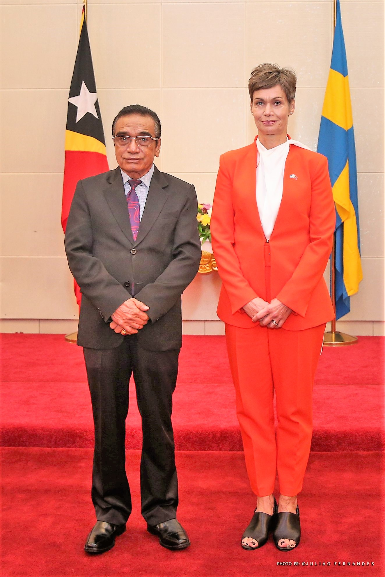 Die schwedische Botschafterin Marina Berg übergibt ihre Akkreditierung an Osttimors Präsident Francisco Guterres